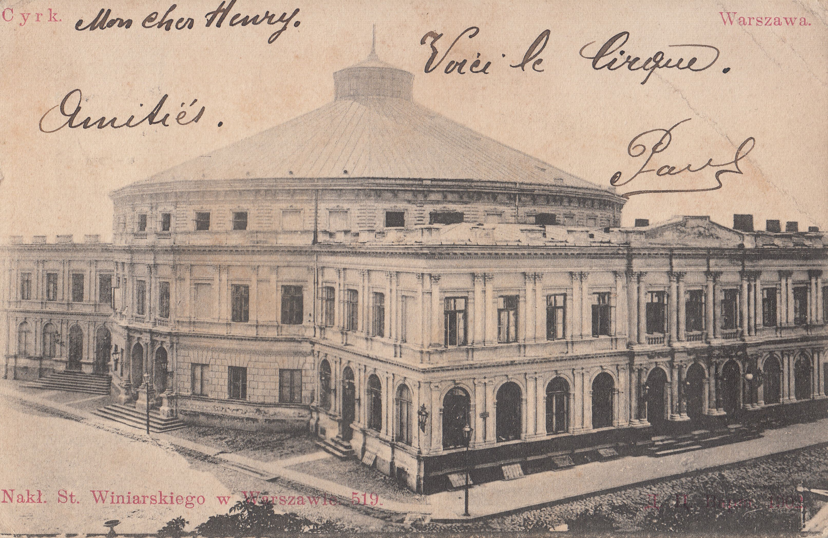 Braci Staniewskich w Warszawie